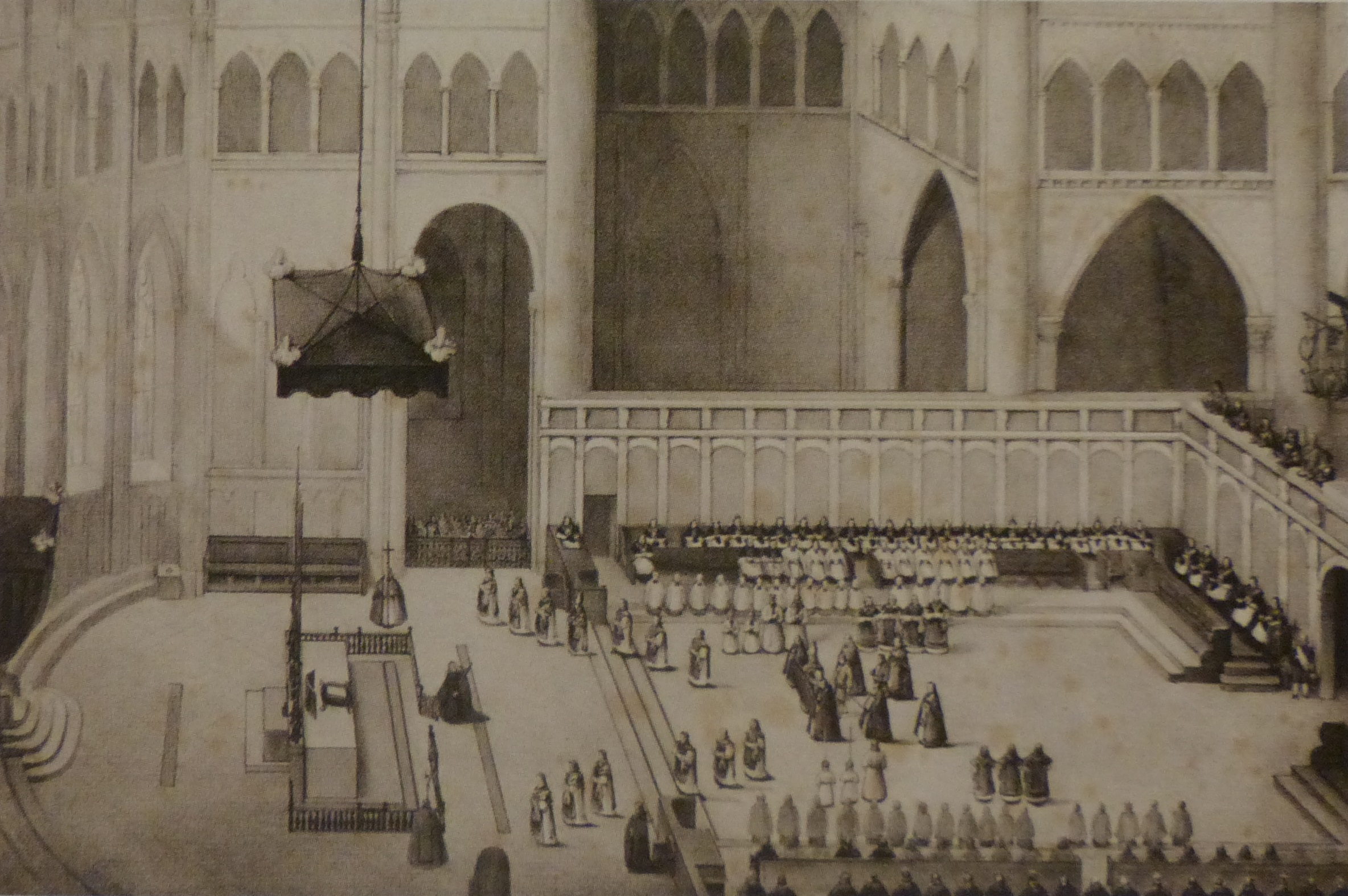 Reconstitution du jubé de la Cathédrale Saint-Jean de Lyon, par Jean-Baptiste Marduel (XIXe siècle)